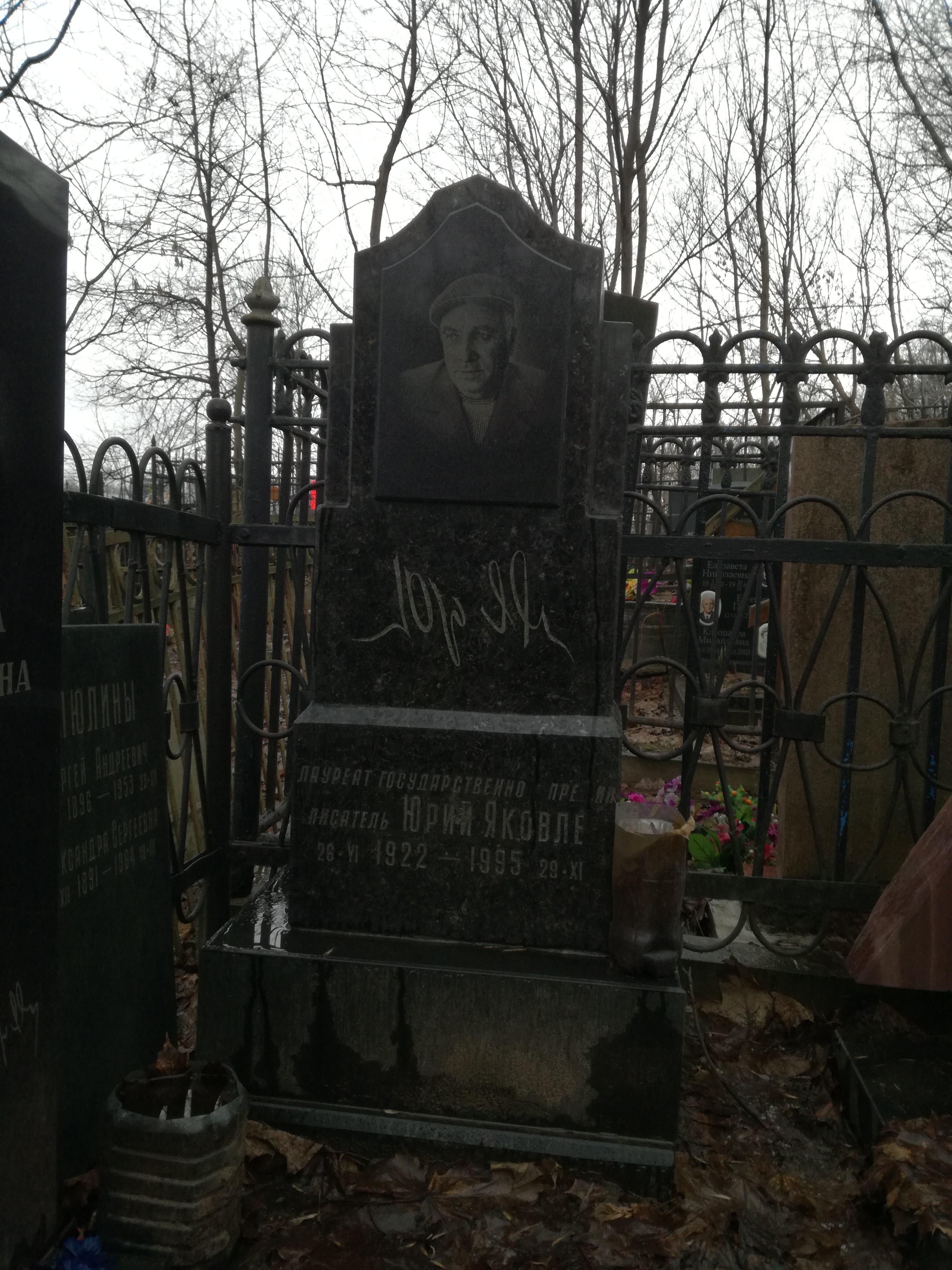 Даниловское кладбище